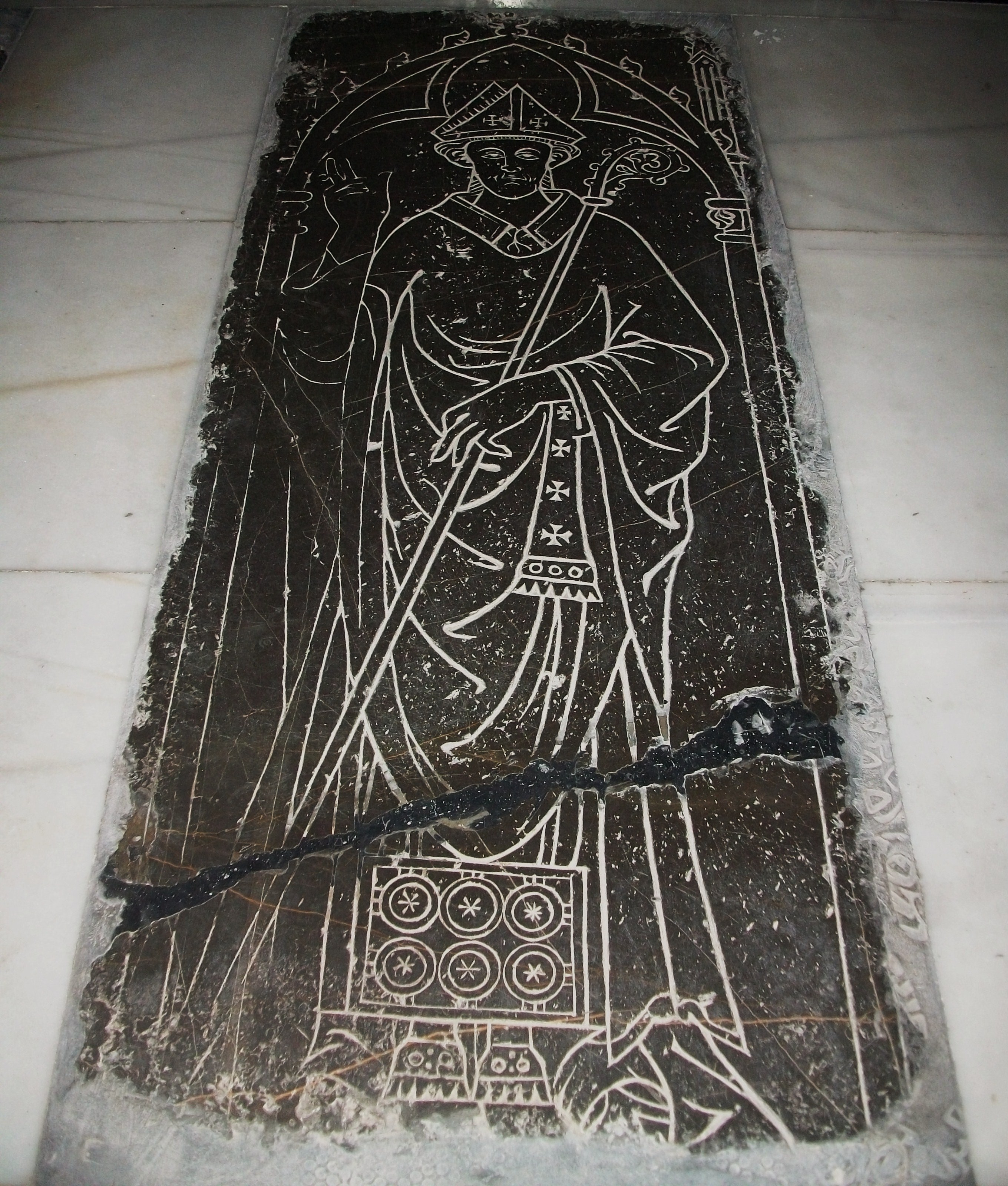 Làpida sepulcral del bisbe de València Ramon o Raimon Despont (? - 1312), catedral de València, capella de sant Donís i santa Margarida.